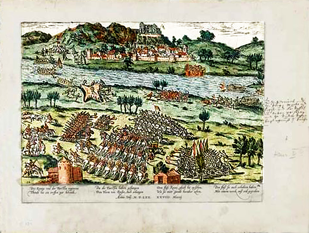 La rencontre des deux armées françoises faite au passage de la rivière du Rosne, avec légende allemande, le 28 Mars 1570.